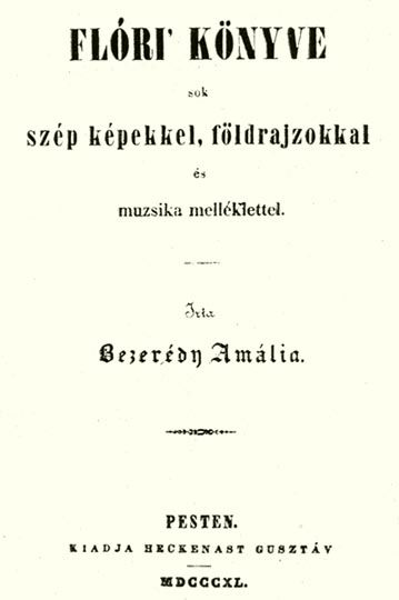 A Flóri könyve 1840-es kiadásának címlapja (Bezerédj Amália)